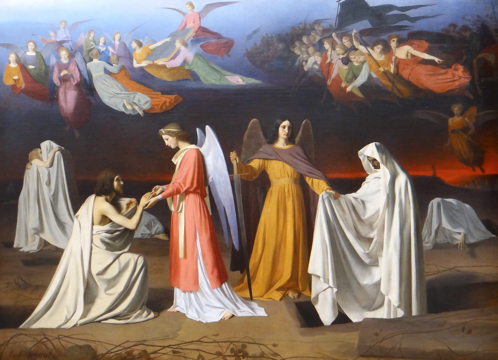 Il n'est pas nécessaire de préciser que le Juste est à gauche sur la photo et le Méchant à droite.